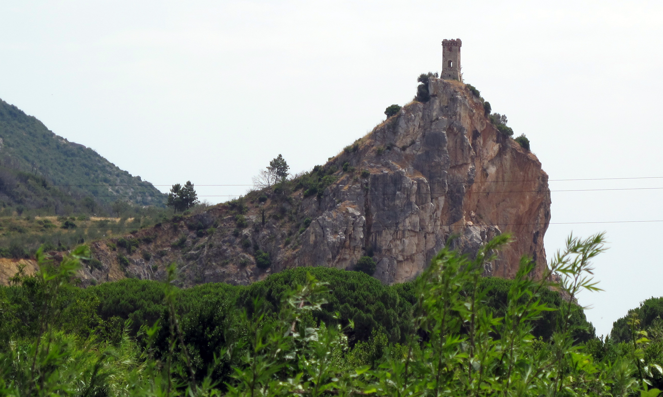 Caprona, Vicopisano, Pisa, Toscana, Italia